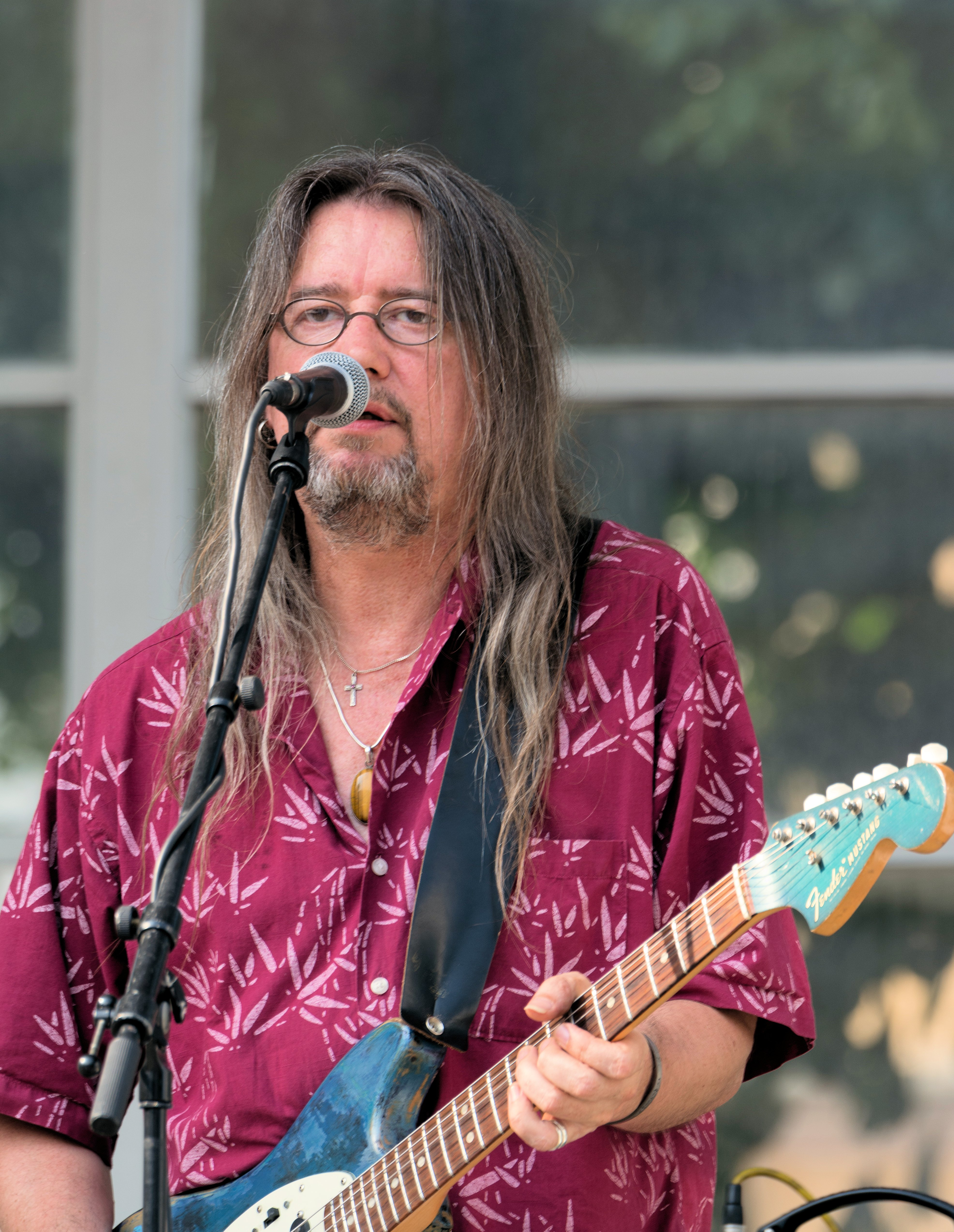 Puka Oinonen, suomalainen kitaristi